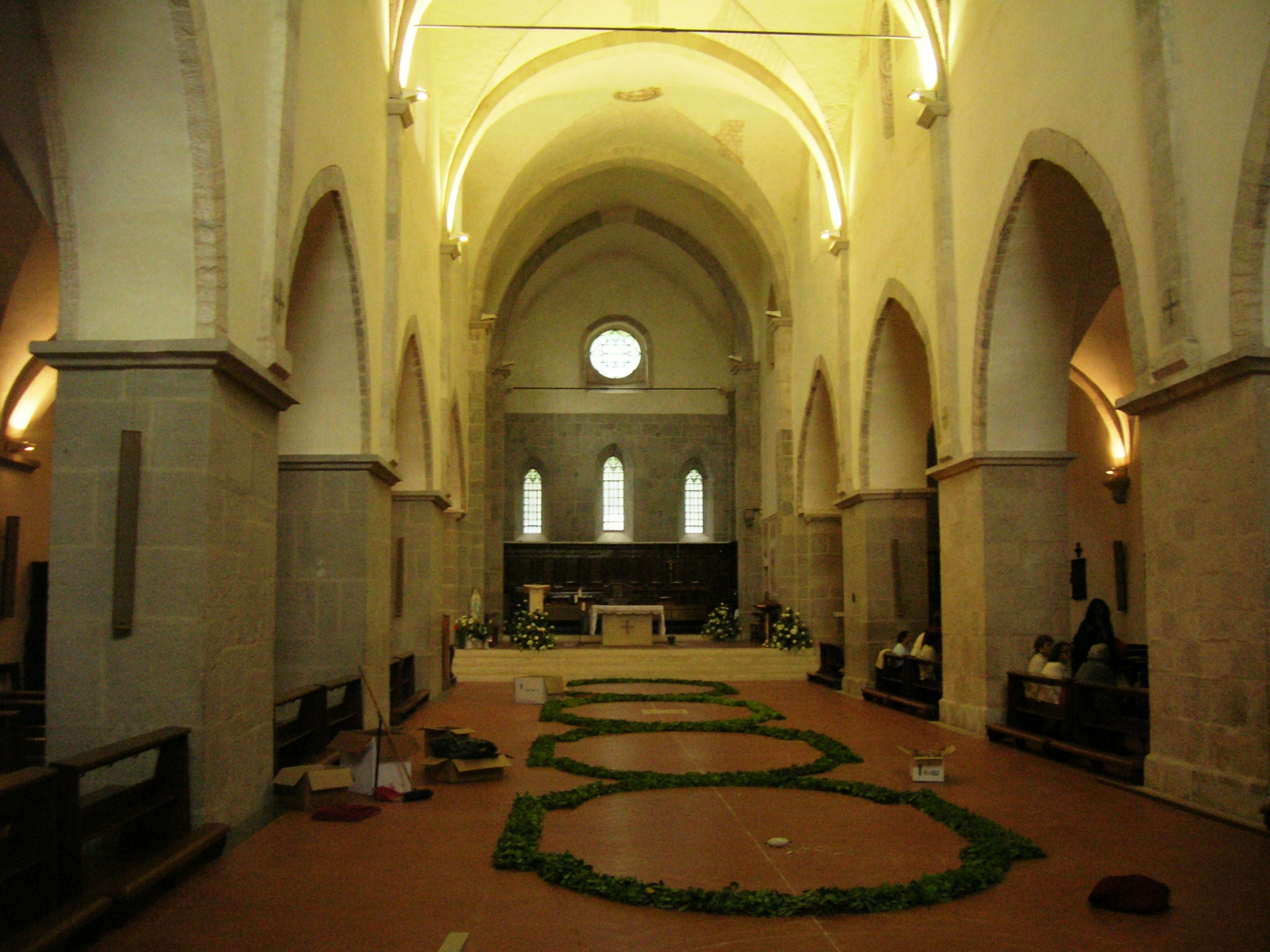 L'interno dell'abbazia